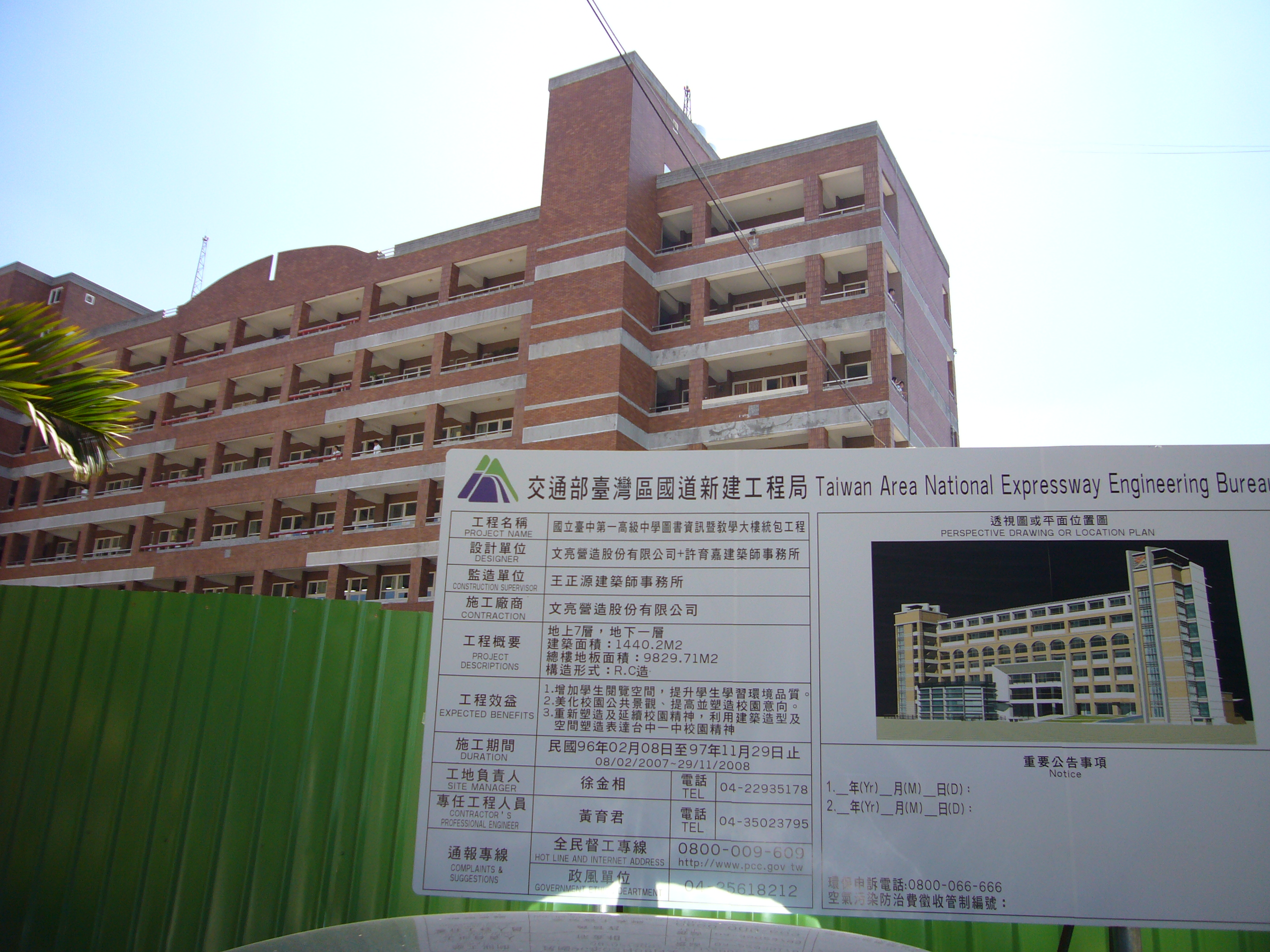 國立臺中第一高級中學圖書資訊暨教學大樓統包工程，交通部臺灣區國道新建工程局建置工程告示牌。左後方建築物為國立臺中第一高級中學麗澤樓。